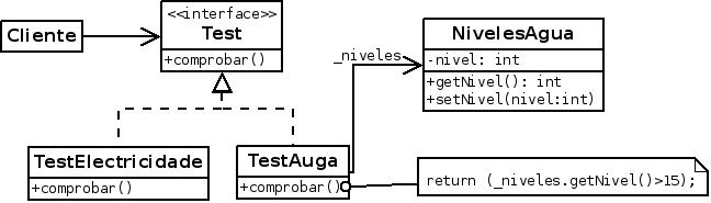 Exemplo de uso do patrón adaptador.